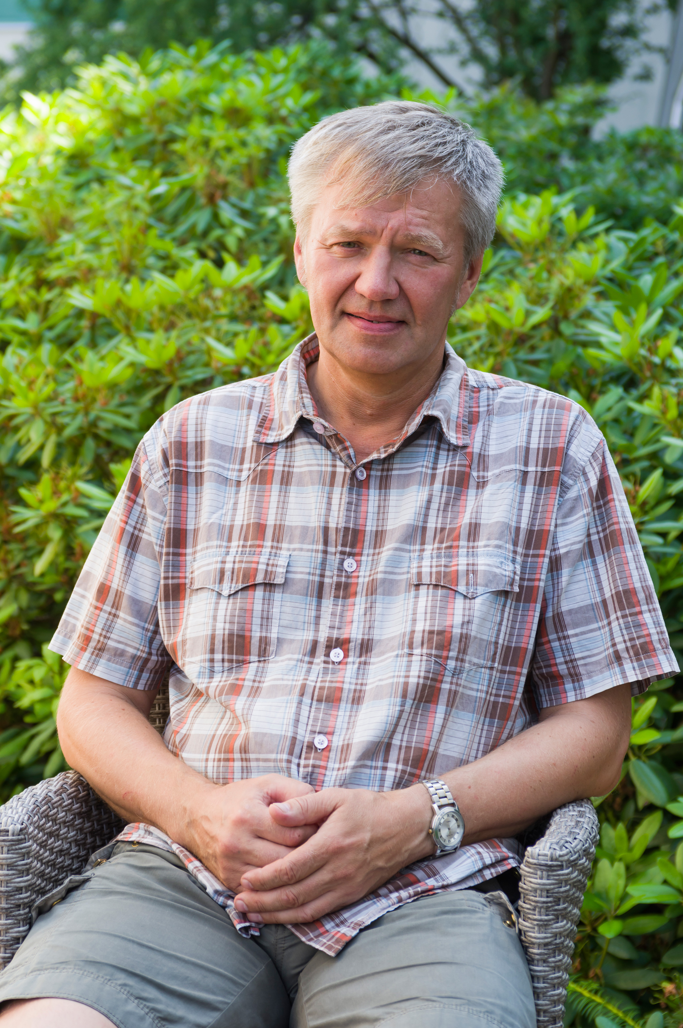 Robert Treufeldt eestikeelse Vikipeedia suvepäevadel 2019